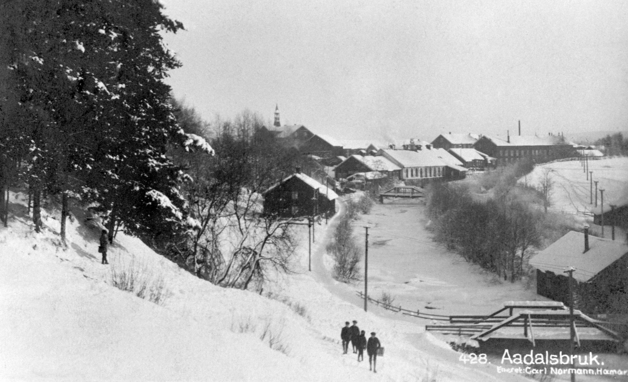 Postkort. Eksteriør: Aktieselskabet Aadals Bruk Jernstøperi, Skrømtbakken, Ådalsbruk, vinter, is på Svartelva, bru, gutter, Løten